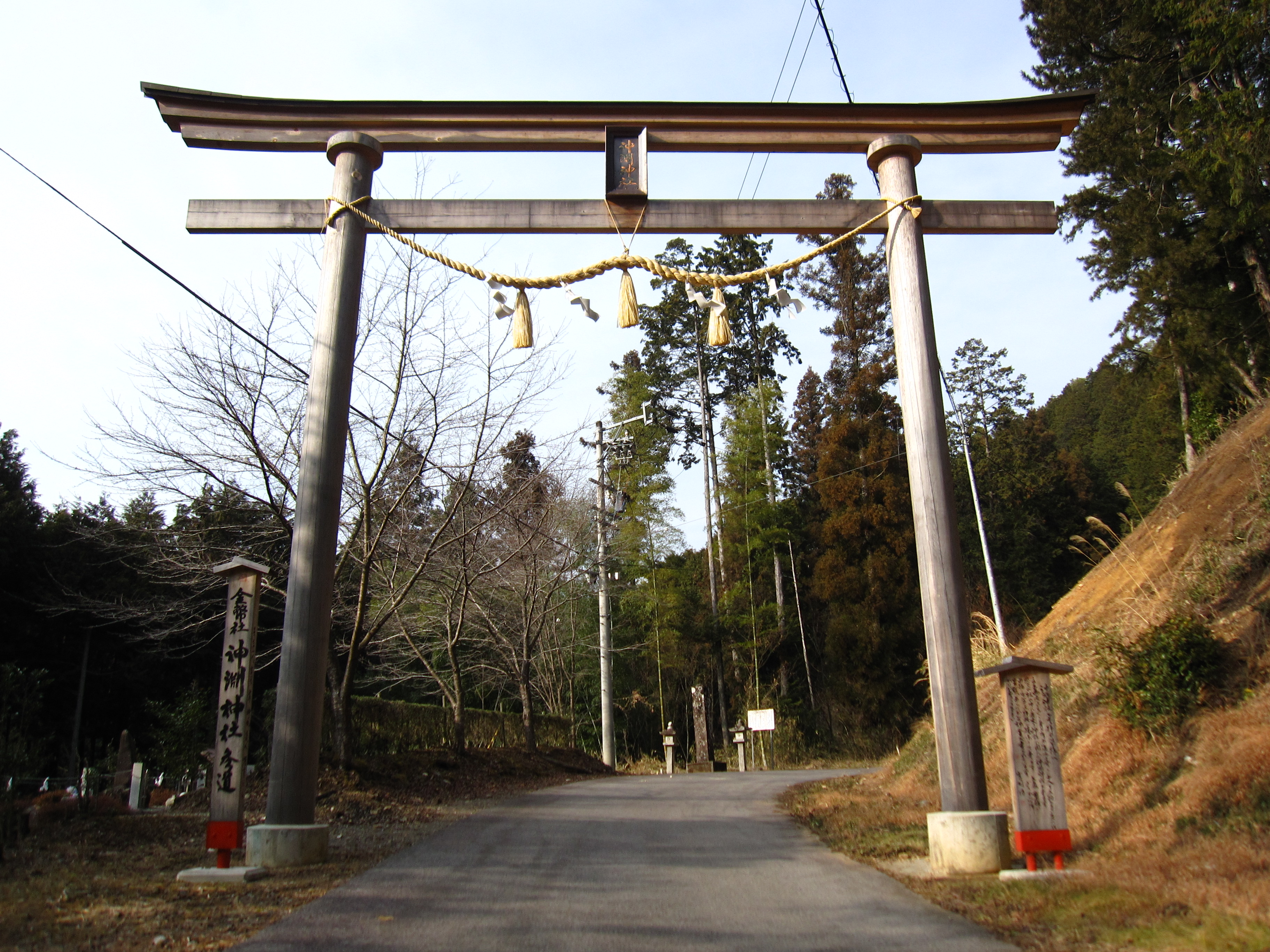 町道からの入り口